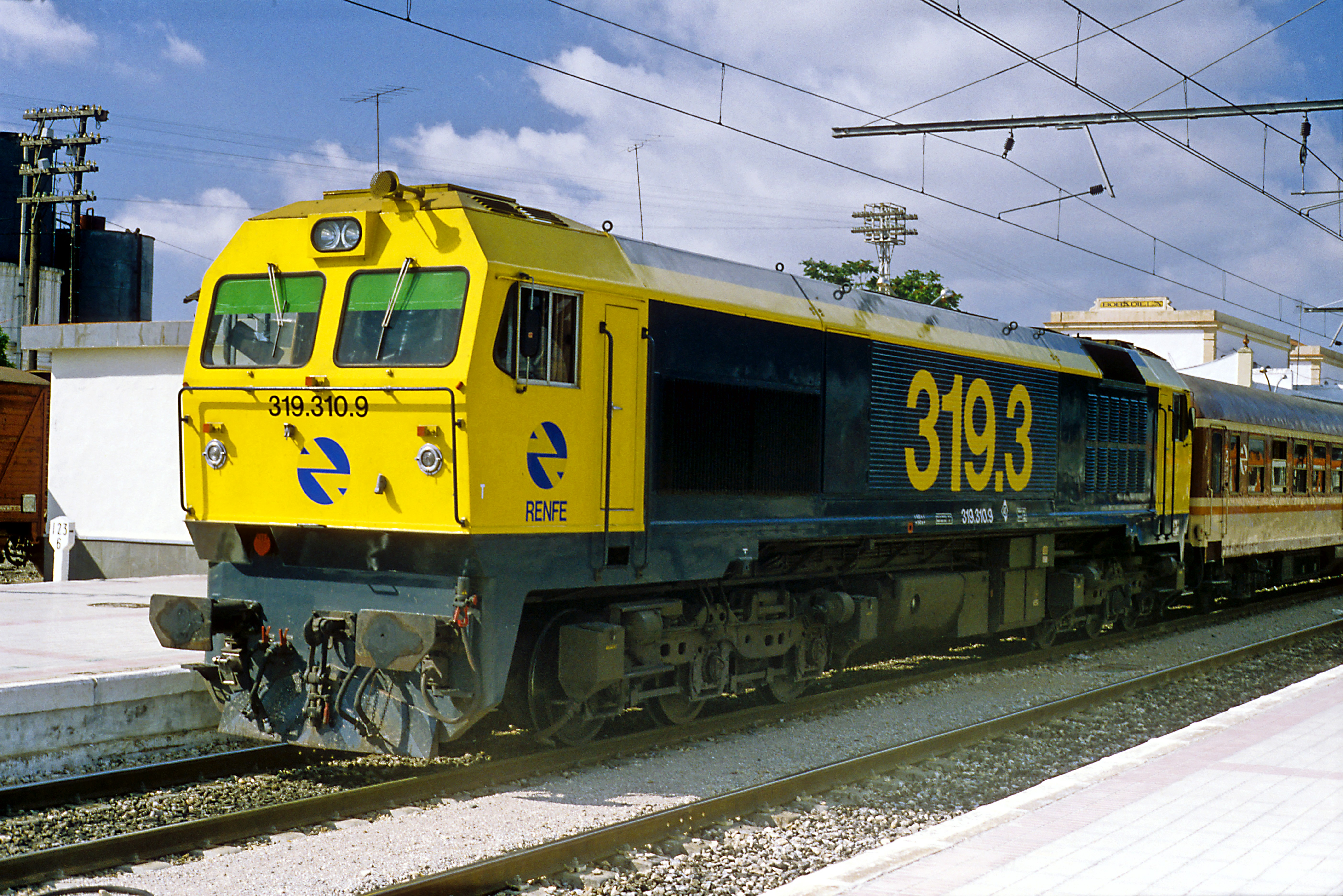 Zustand nach mehreren Umbauten. Die Drehgestelle mit gegossenen Rahmen zeigen die US-Herkunft recht deutlich. Die Unterbaureihe 319.3 ist vor allem für den Reisezugdienst beschafft worden, dafür liegt die zulässige Gesschwindigkeit bei 140km/h und zusätzlich sind die Maschinen mit einer elektrischen Zugheizeinrichtung ausgerüstet.